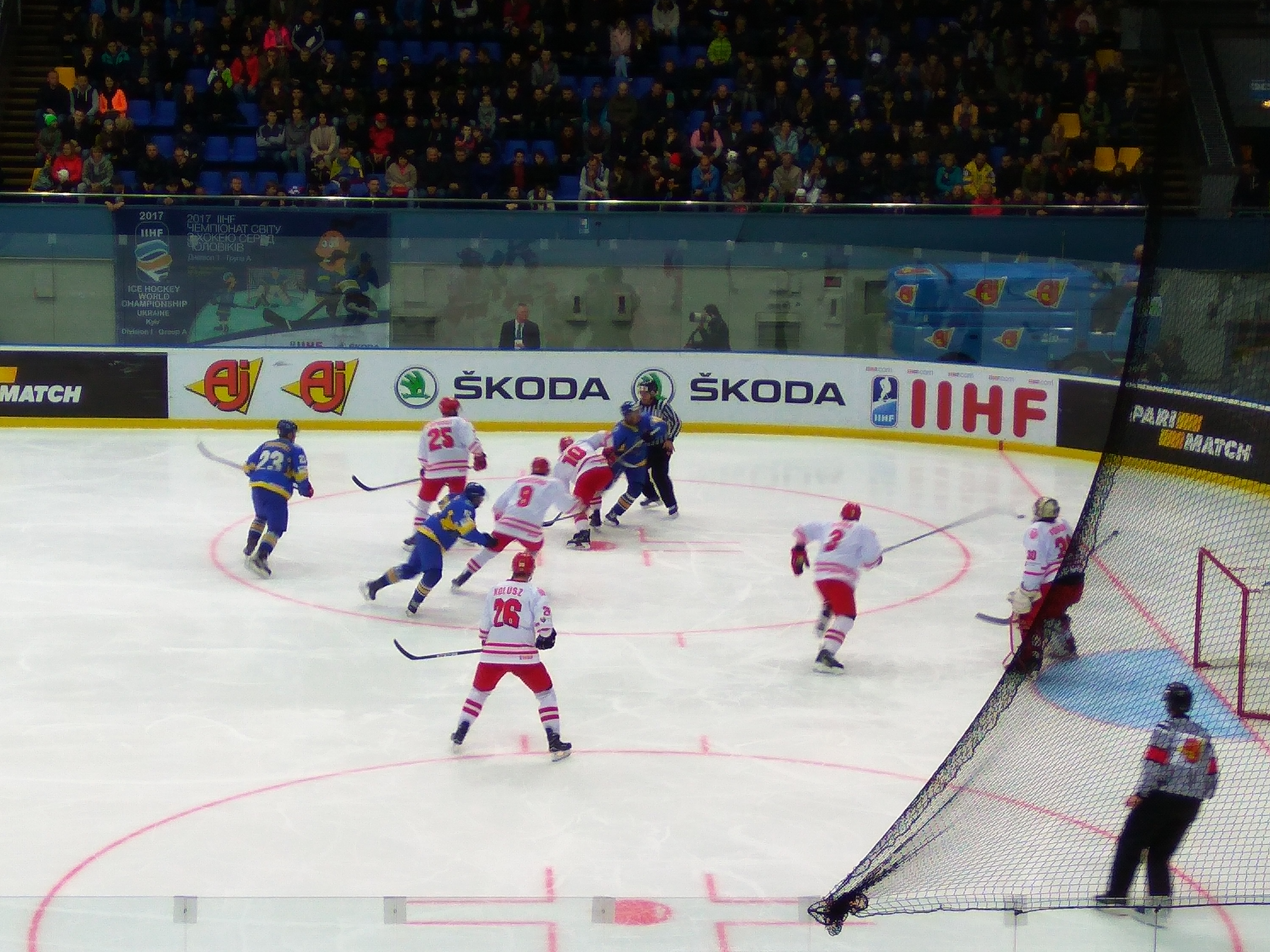 Чемпіонат світу з хокею 2017 у першому дивізіоні. Польща-Україна